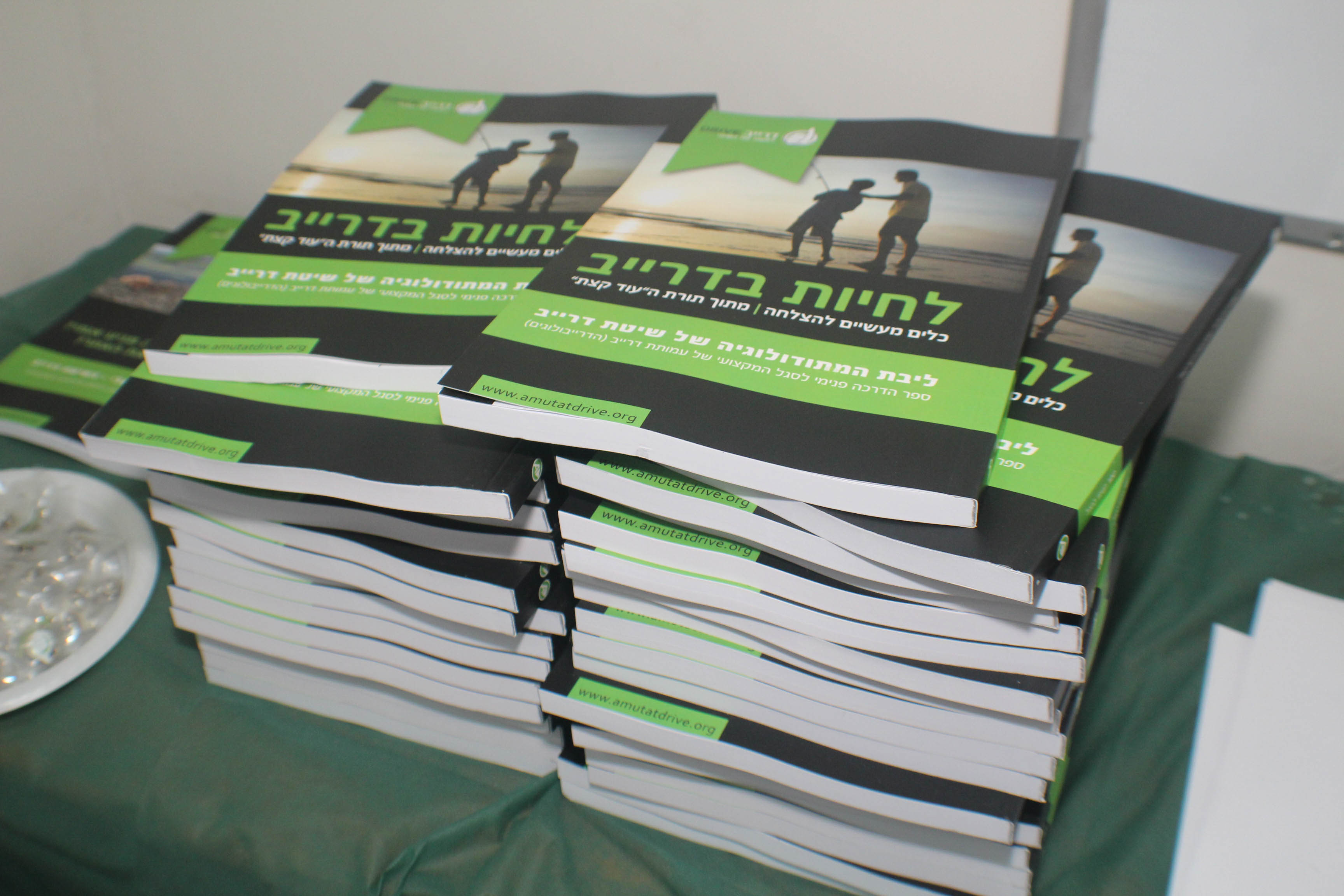 דרייב - ספר המתודולוגיה